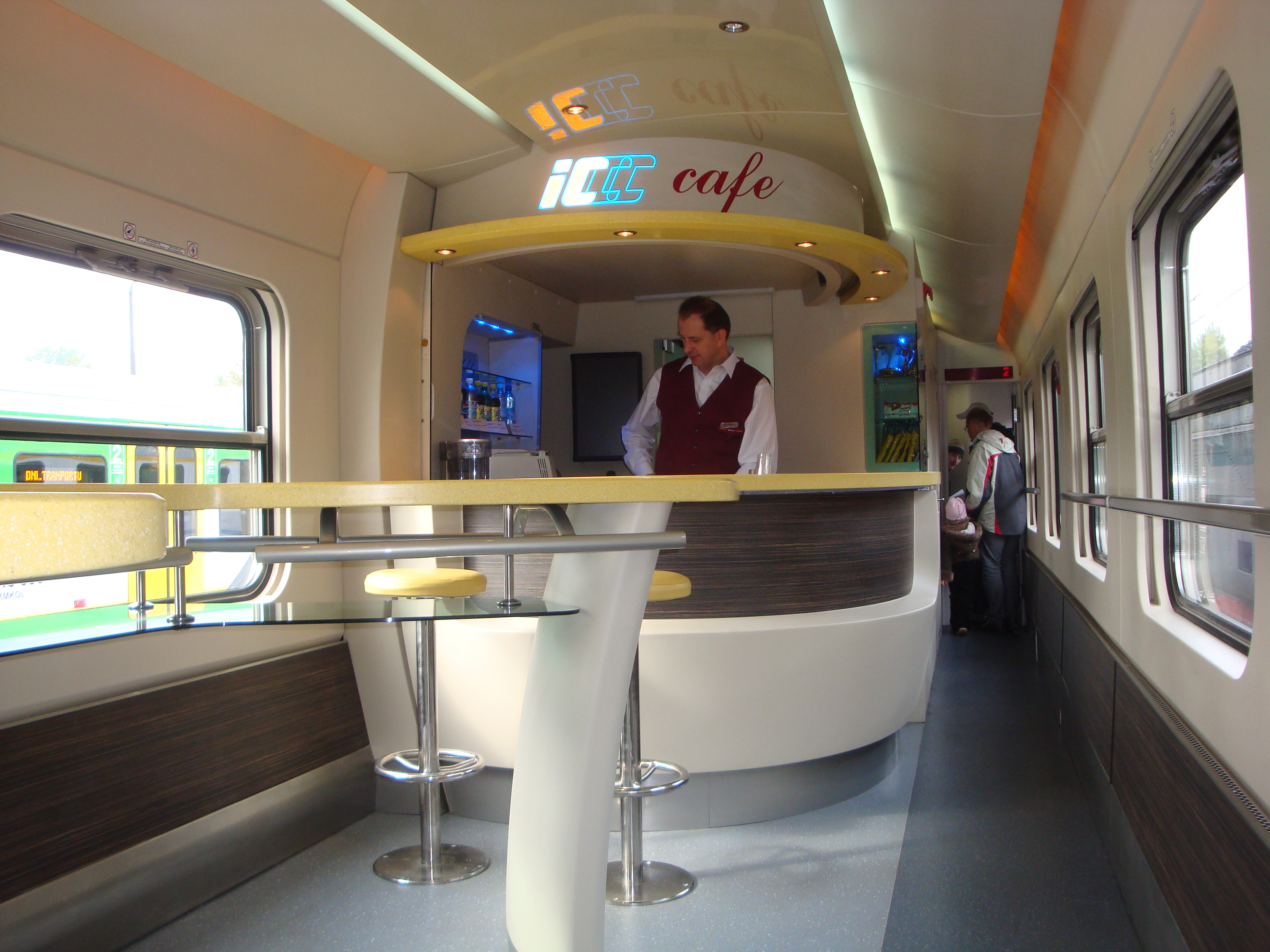 Wnętrze wagonu barowego IC Cafe.